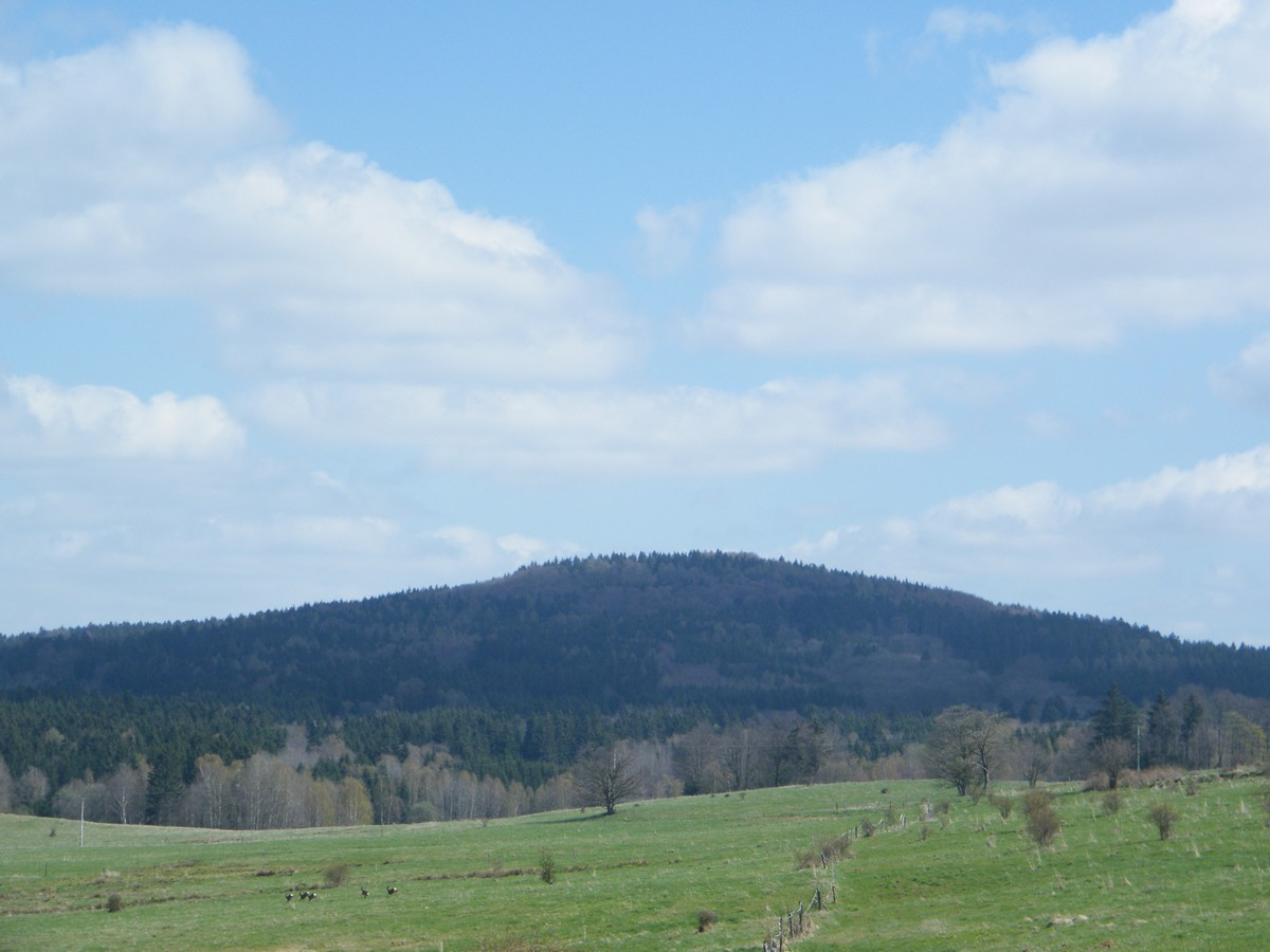 Plešný, pohled od Mikulášovic